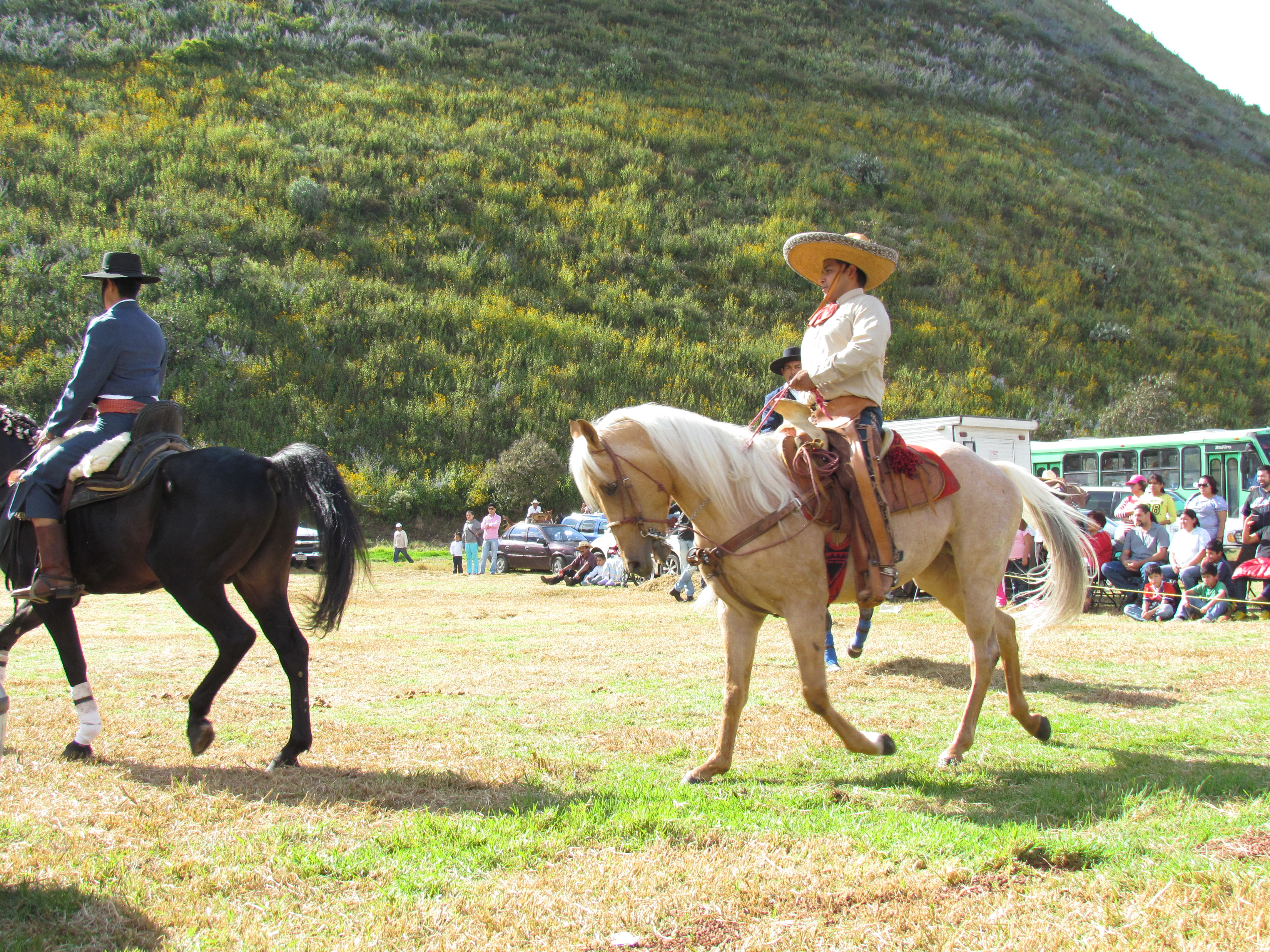 Charreria en la feria del Mole 2014, Mexico DF